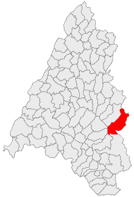 Categorie:Hărţi ale judeţului Bihor